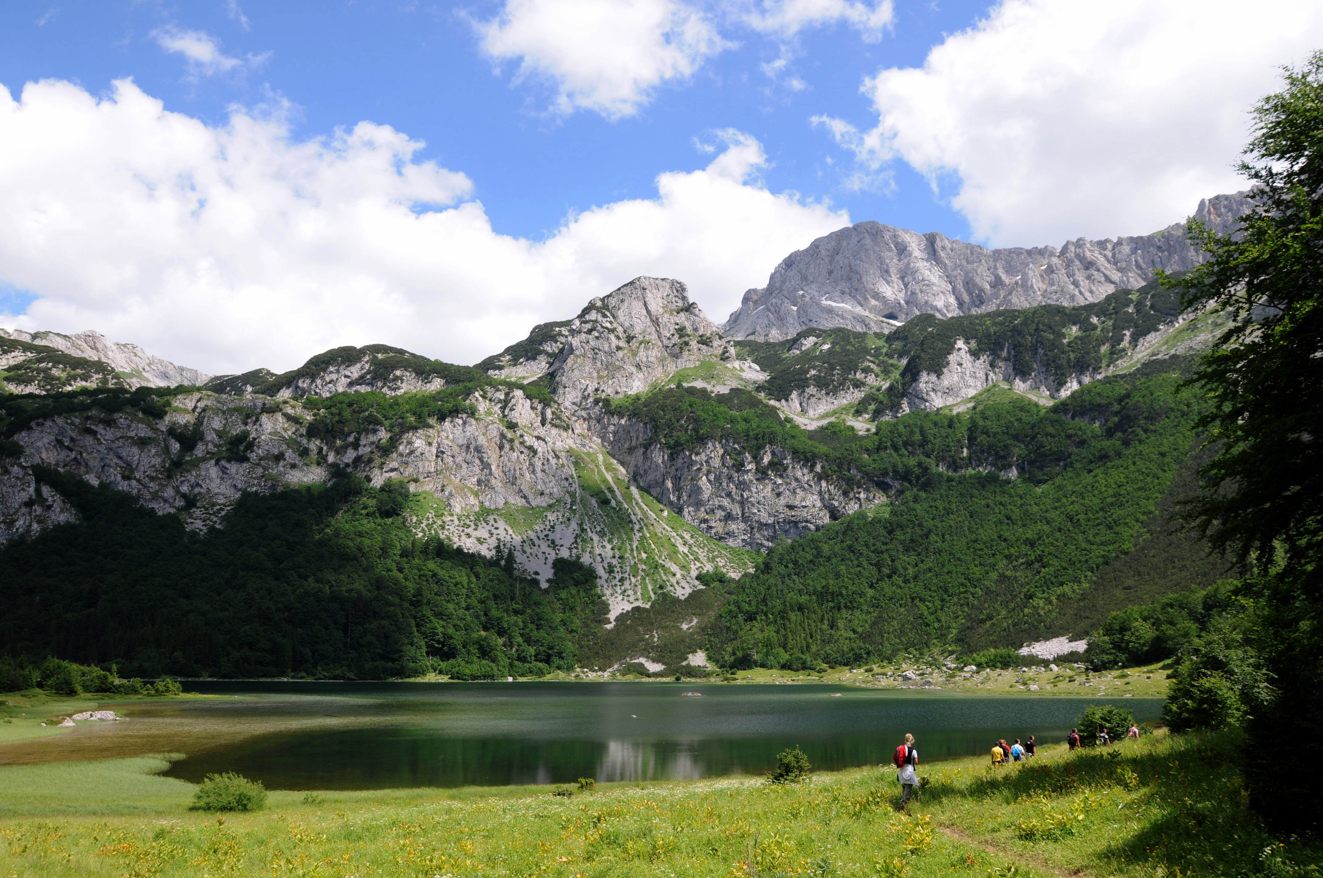 nacionalni park sutjeska trnovacko jezero i planina maglic